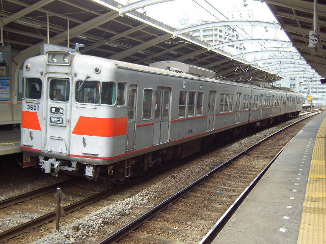 山陽電鉄3000系 アルミ車3002編成の3601号 山陽垂水駅